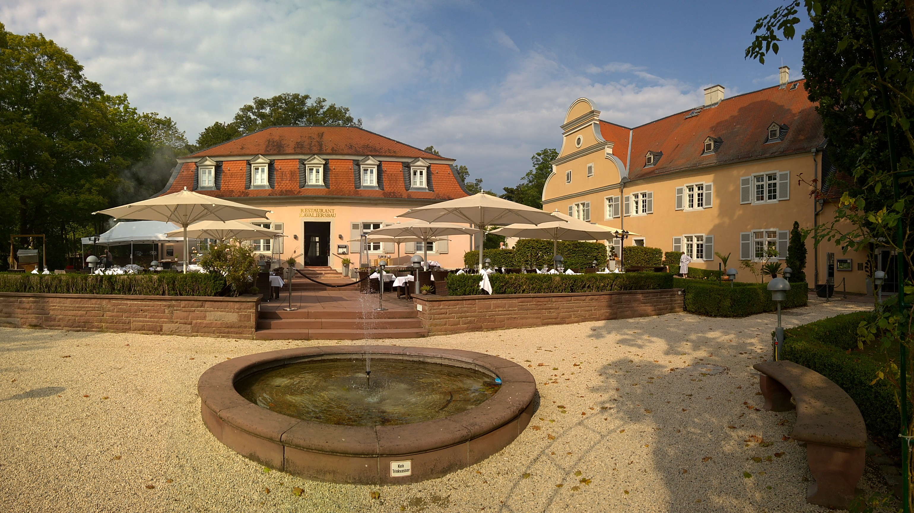 Der Kavaliersbau (-haus) am Jagdschloss Kranichstein aus dem frühen 18. Jahrhundert. Eingeschossig, 5-achsig, Mansarddach. Heute Restaurant.